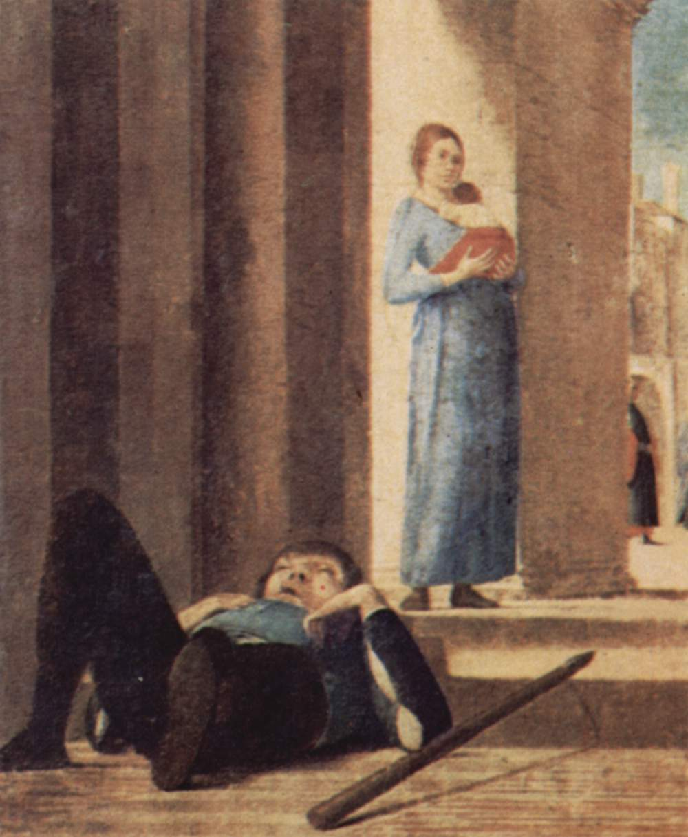 detail